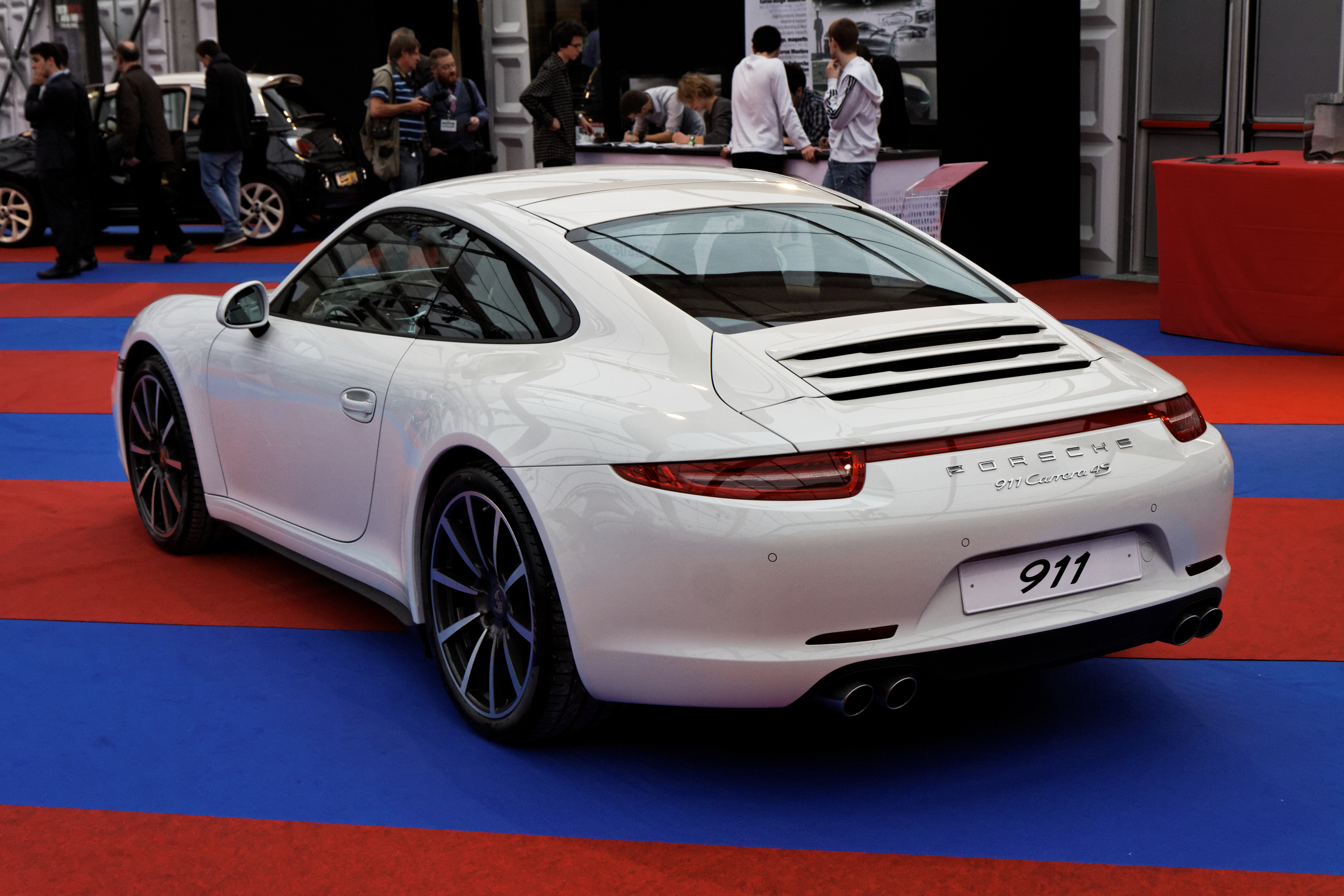 Une Porsche 911 type 991 Carrera C4 S exposée lors du festival automobile international 2013.